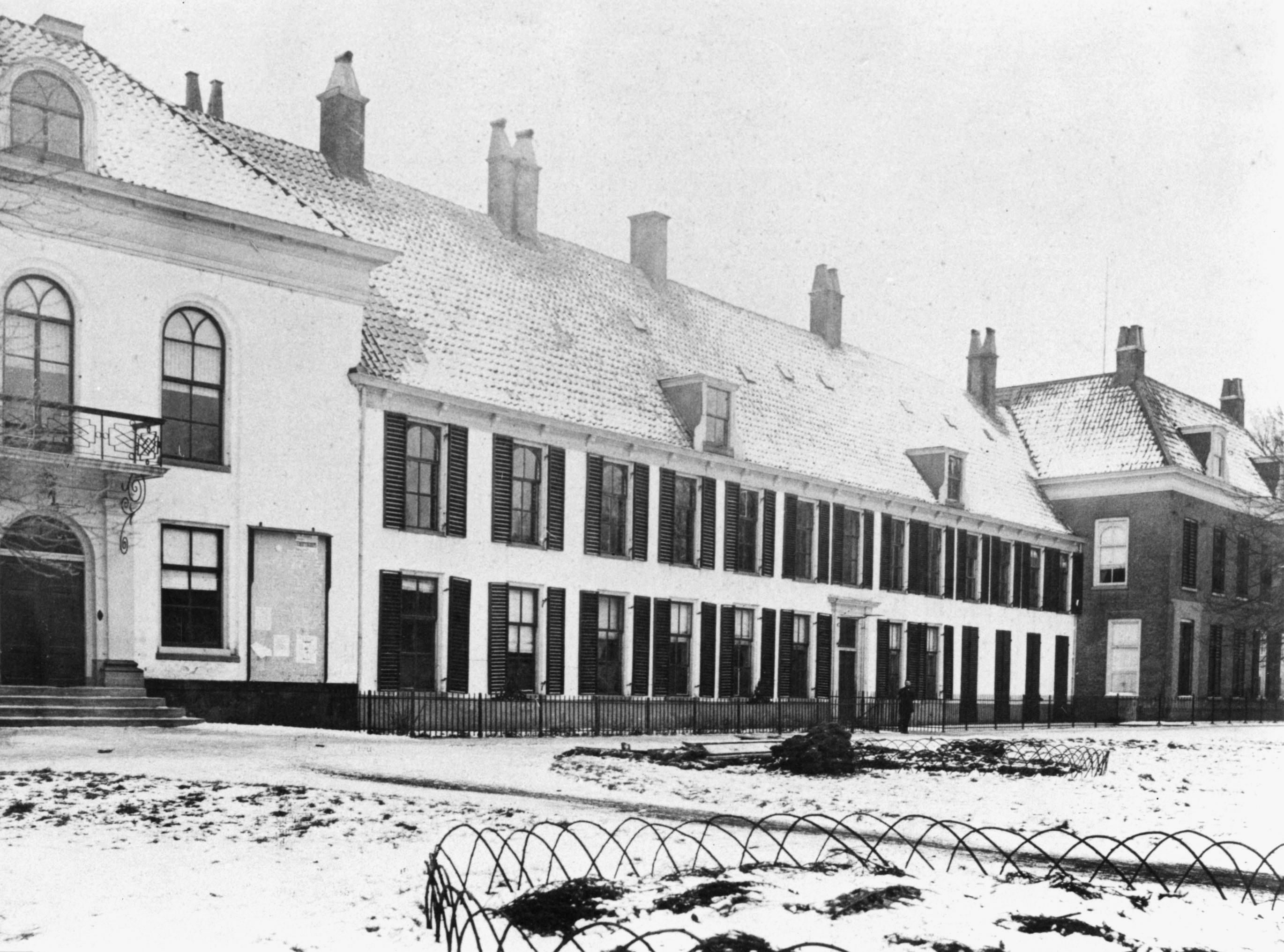 Gemeentehuis: Het Gouvernementshuis aan de Brink